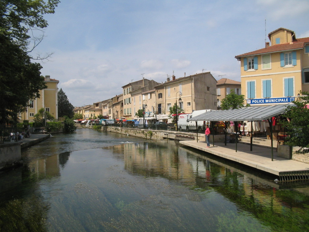 La Sorgue à L'Isle-sur-la-Sorgue (Vaucluse, France).